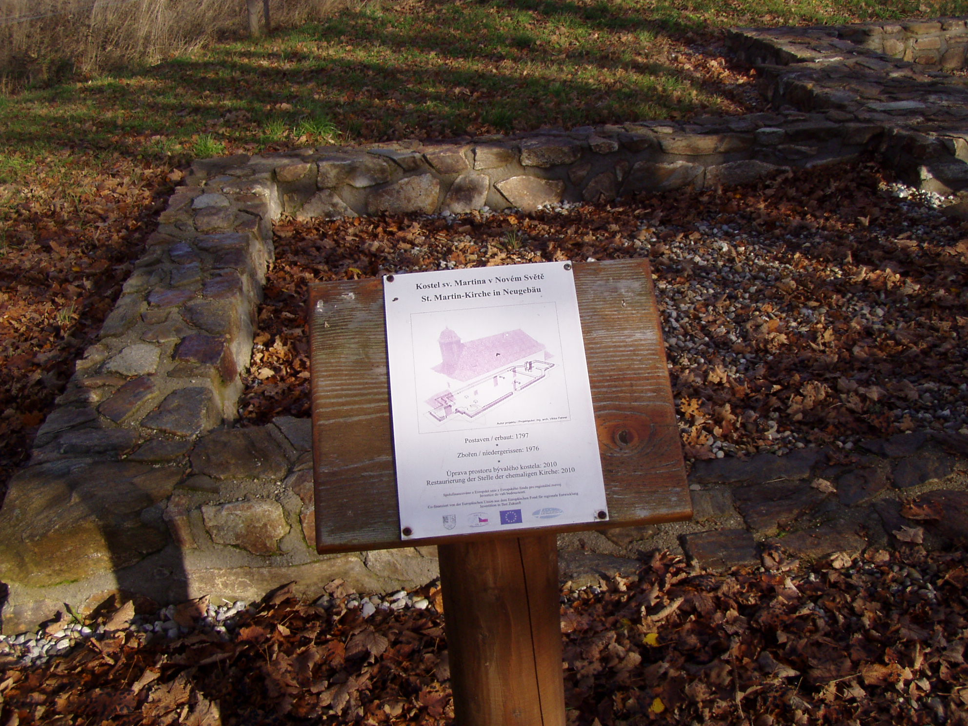 Kostel sv. Martina (Nový Svět)